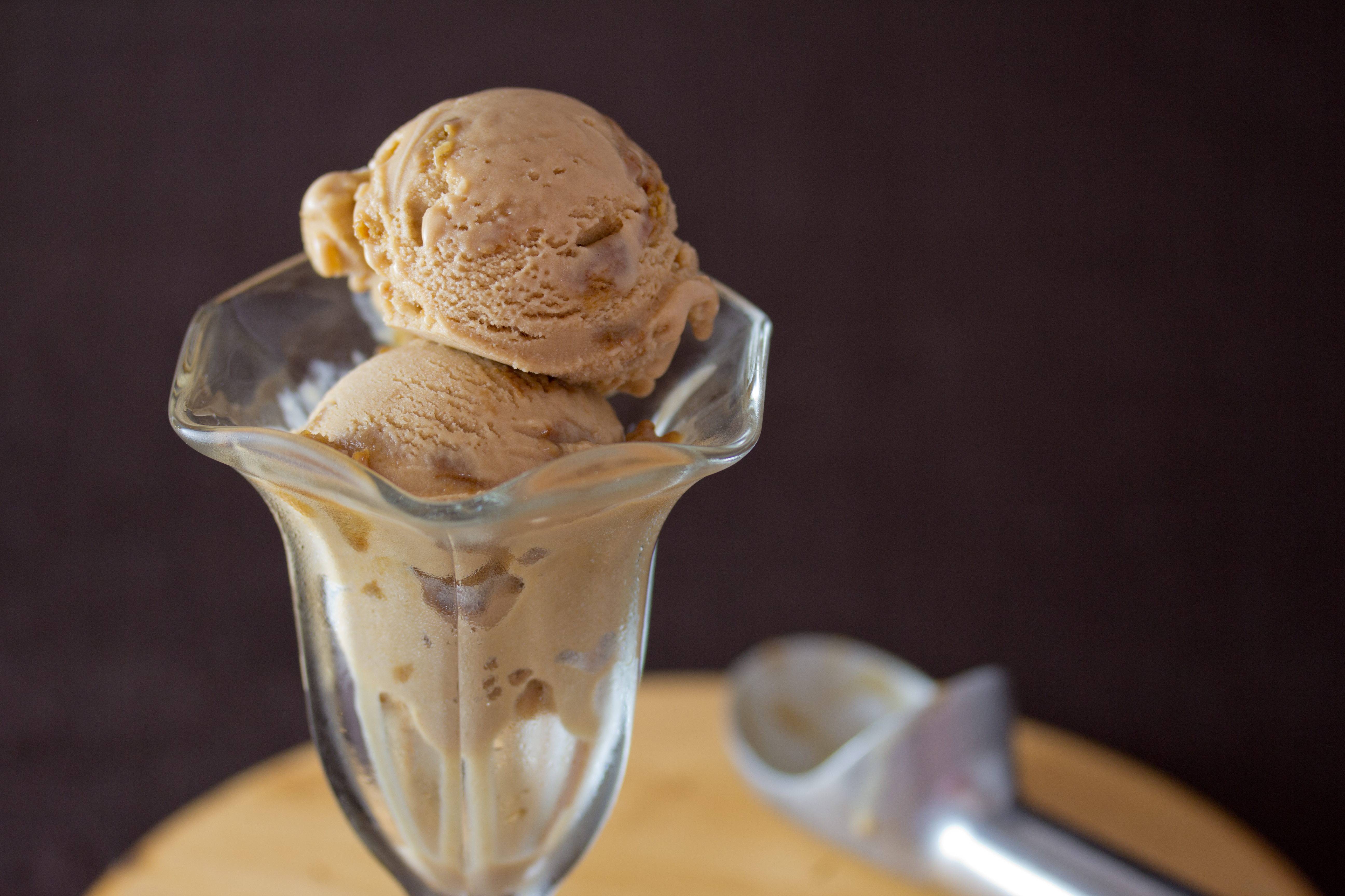 Vegan Gingersnap Cookie Ice Cream